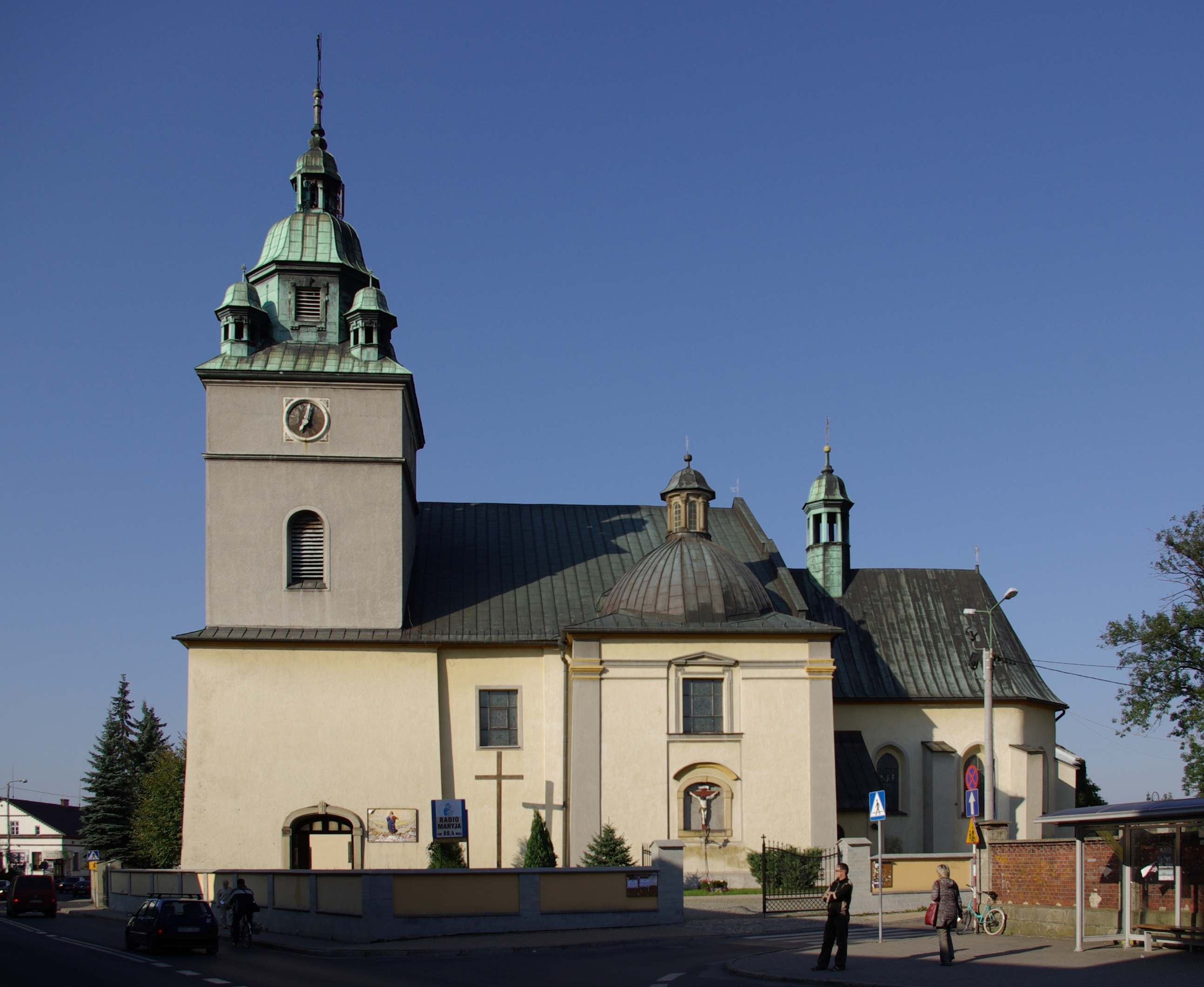 Kościół Świętych Małgorzaty i Katarzyny w Kętach